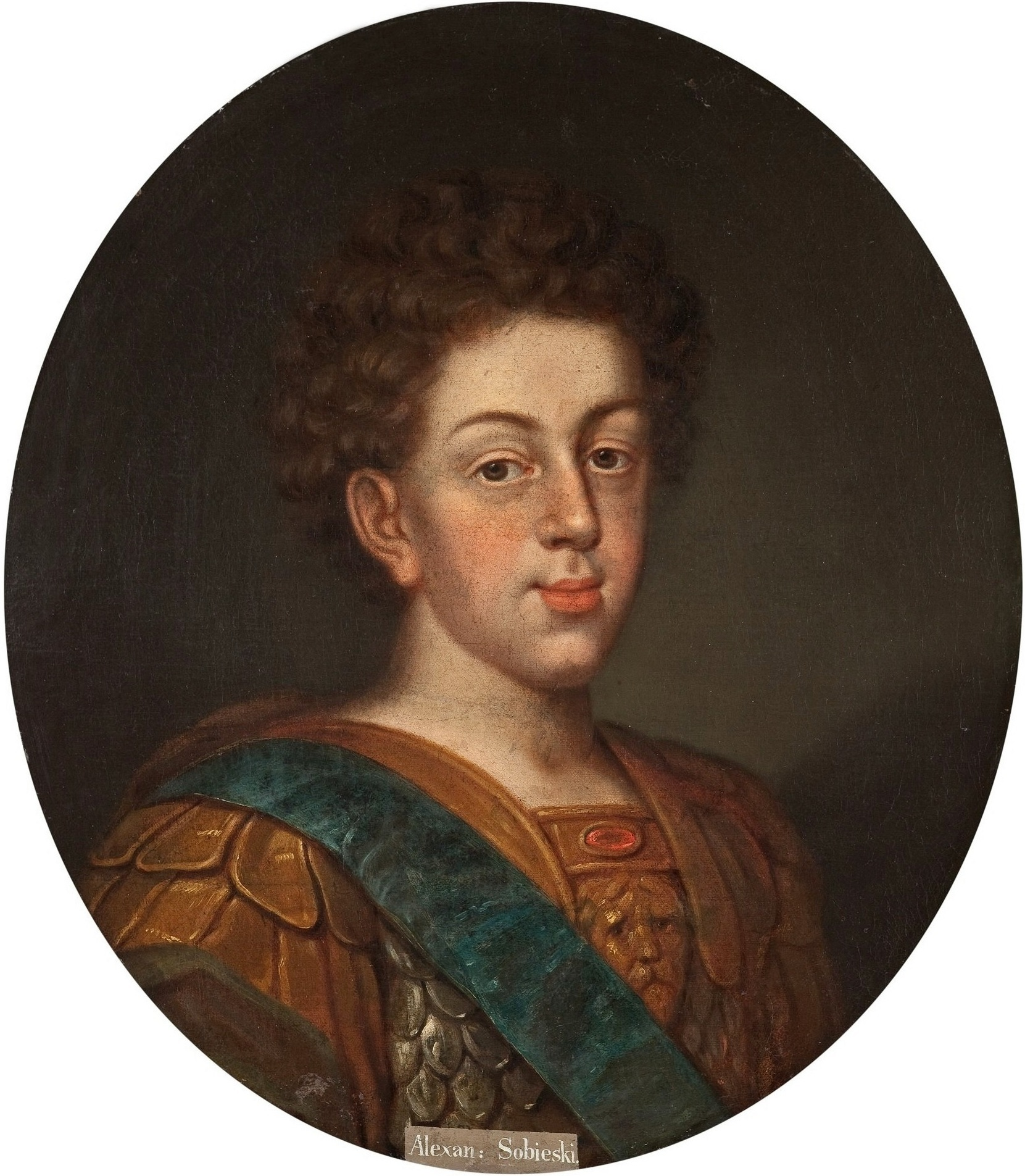 Aleksander Benedykt Sobieski